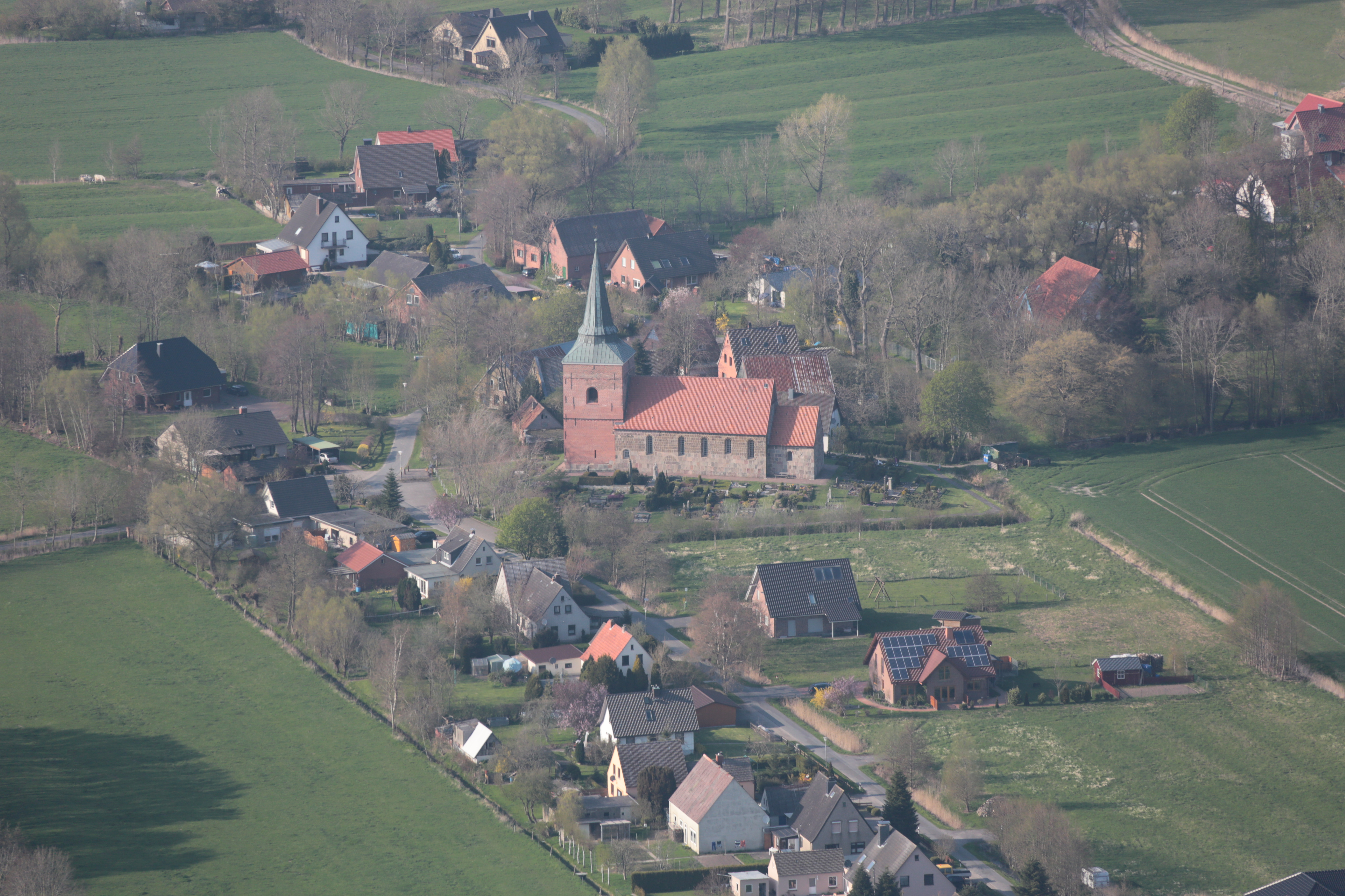 Fotoflug von Nordholz-Spieka nach Oldenburg und Papenburg: St.-Matthäus-Kirche Padingbüttel This photo was taken by Alchemist-hp. If you use one of my photos, an email (account needed) or a message or direct to: my email account would be greatly appreciated. Please note the license terms. Other licensing terms can get discussed, too. This file is copyrighted and has been released under a license which is incompatible with Facebook's licensing terms. It is not permitted to upload this file to Facebook.